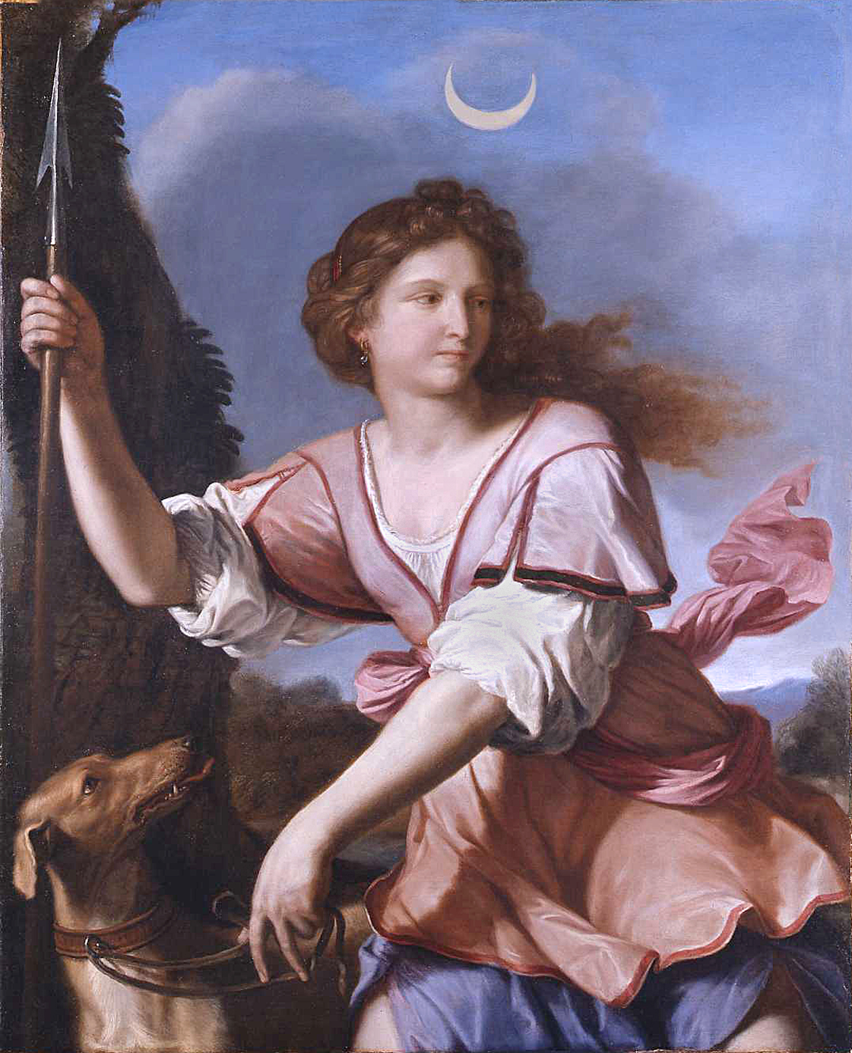 Diana Cacciatrice. Olio su tela. 96,8 x 121,3 cm. Fondazione Sorgente Group, Roma.